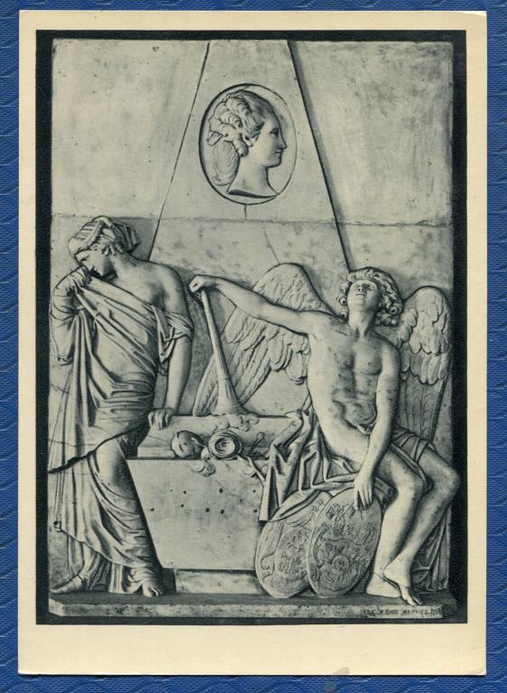 Надгробие М. П. Собакиной - скульптор Иван Петрович Мартос (1754—1835), академик Императорской Академии художеств.